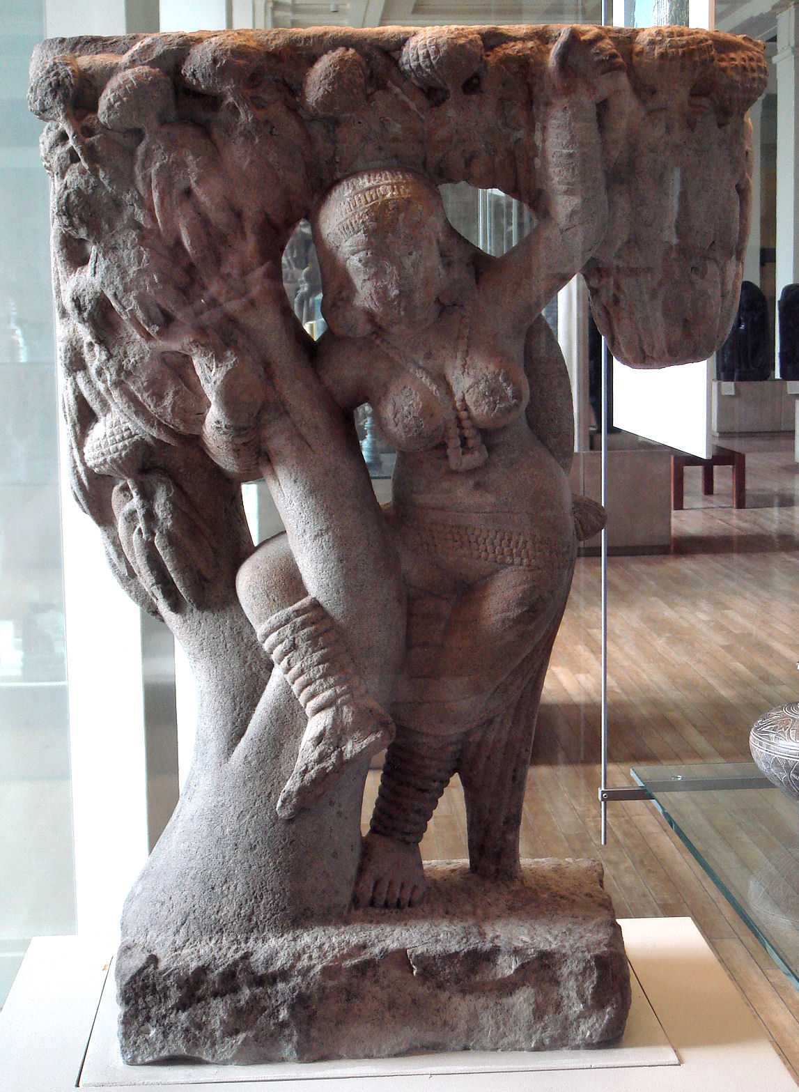 Sanchi Bracket Figure